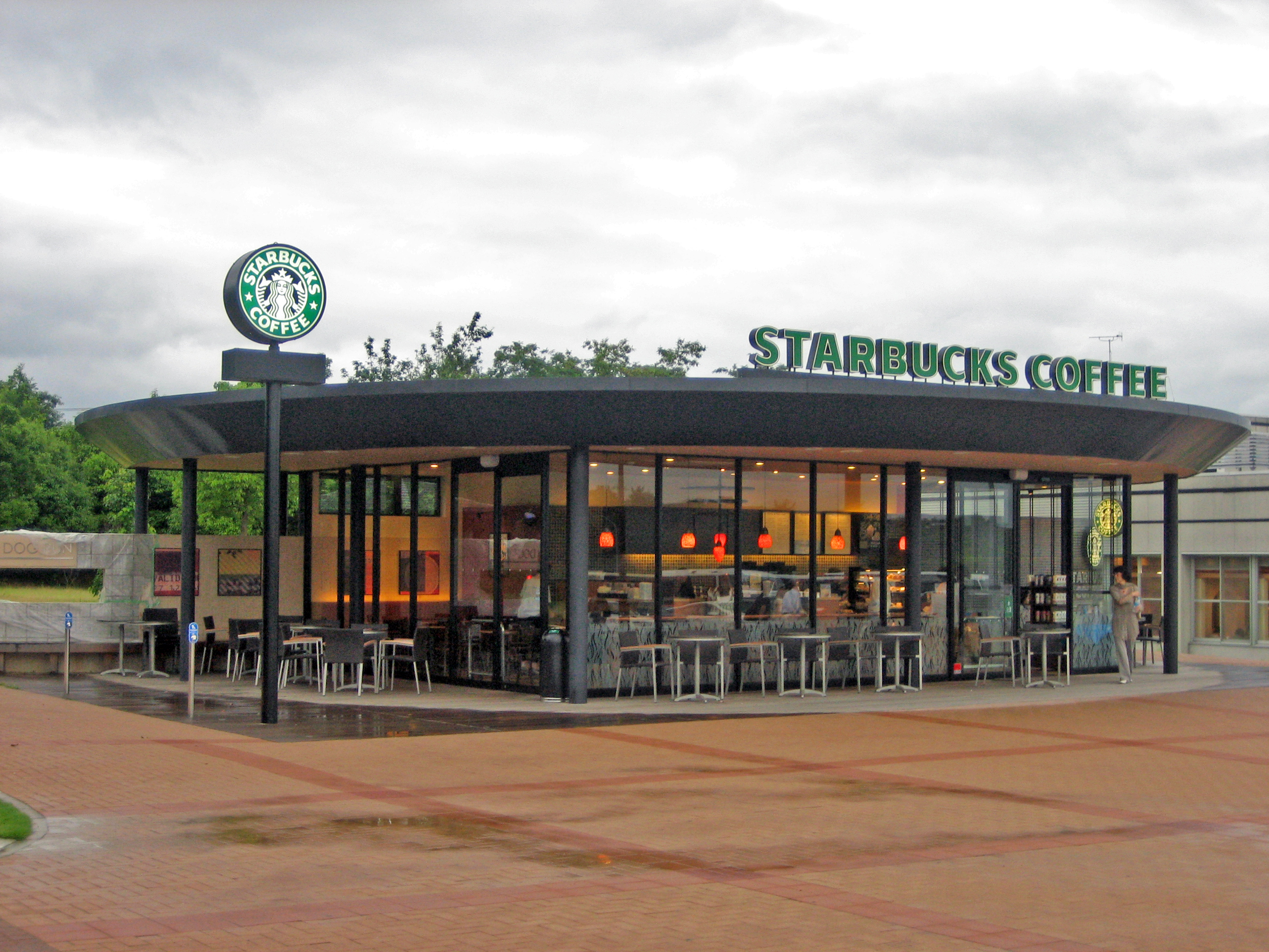 山陽自動車道下り線三木サービスエリアにあるスターバックス三木サービスエリア店。